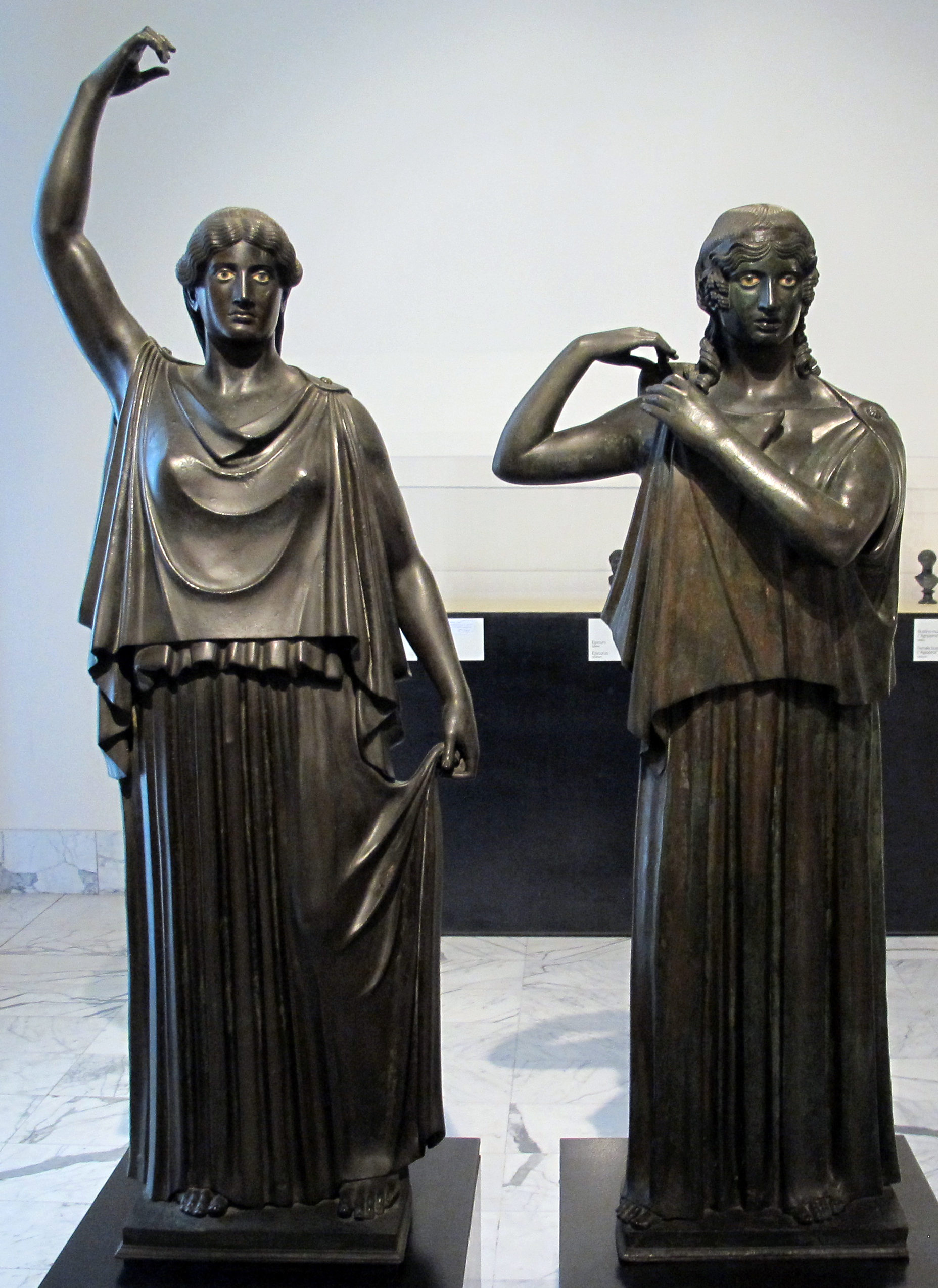 Ancient Roman art from the Villa of the Papyri (Herculaneum)